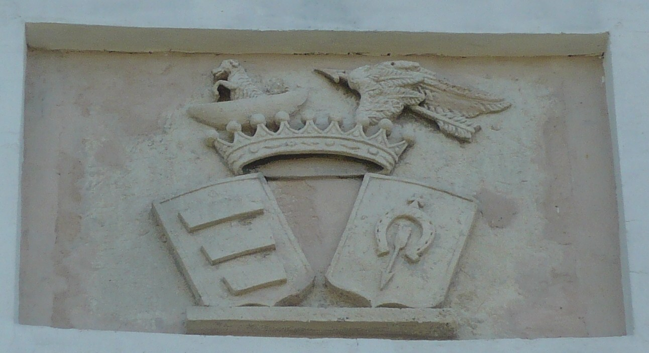 Tablica herbowa. Kościół ormiański pw. Niepokalanego poczęcia NMP